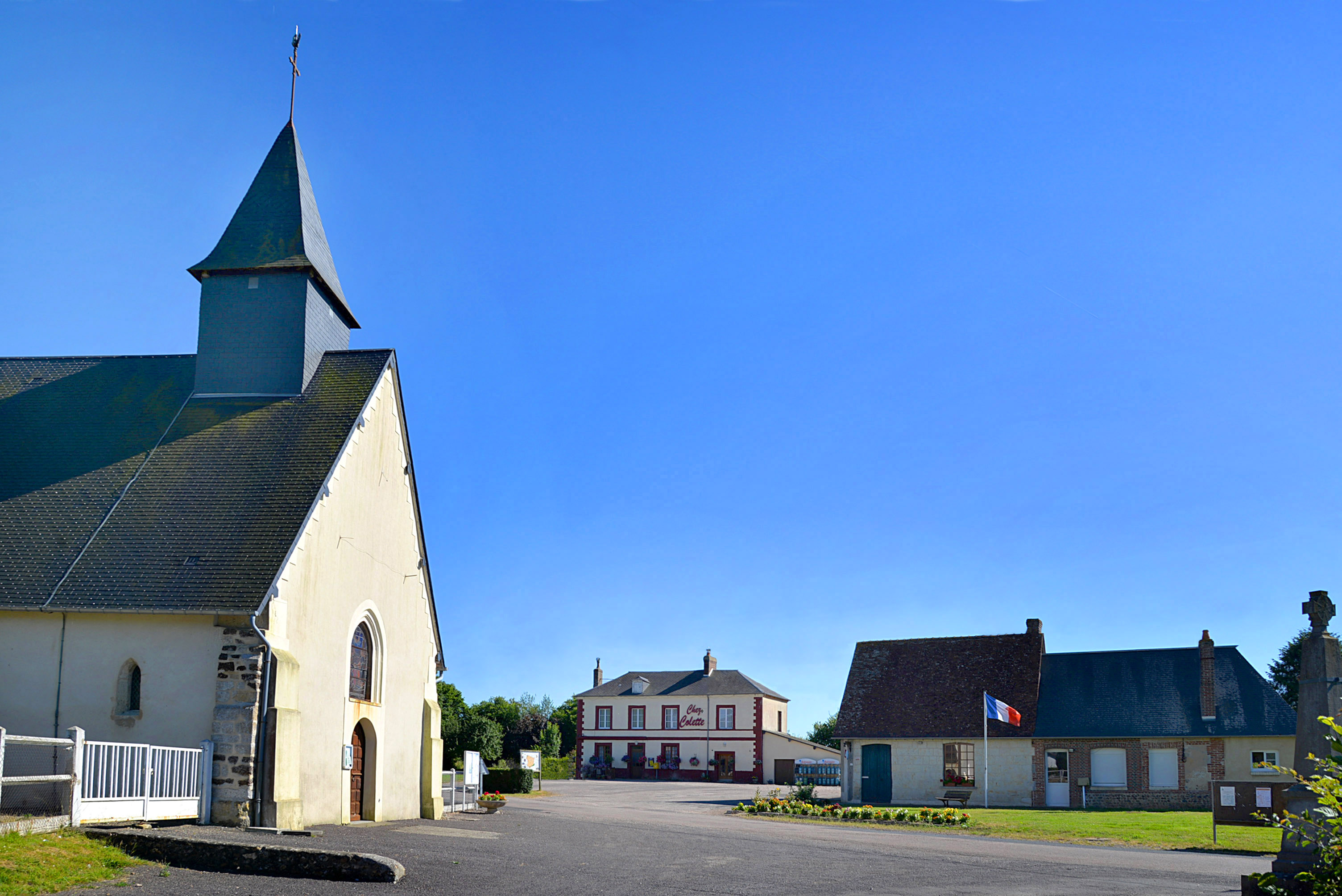 Cernay (Calvados)